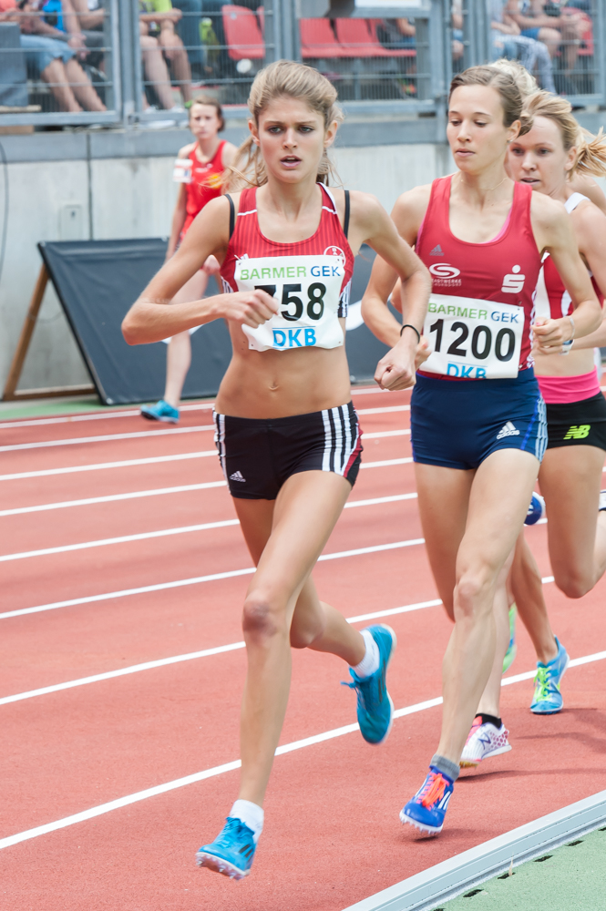 Deutsche Leichtathletik-Meisterschaften 2015: Frauen 1500m - Konstanze Klosterhalfen